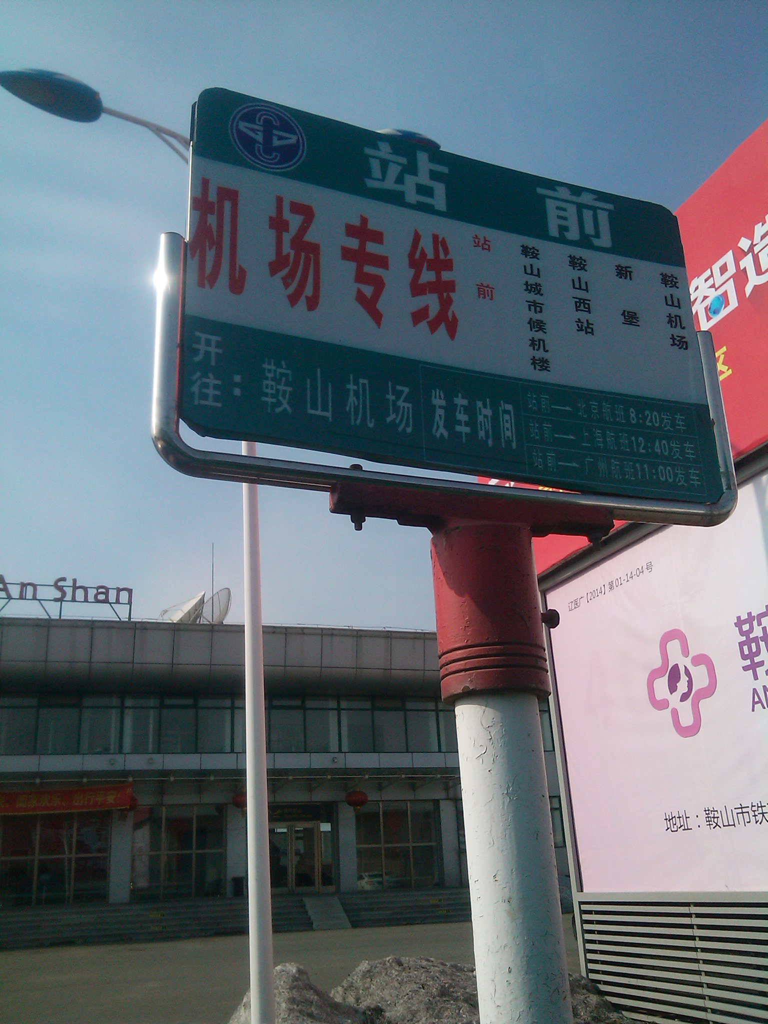 展示了鞍山市机场专线的时刻和停站